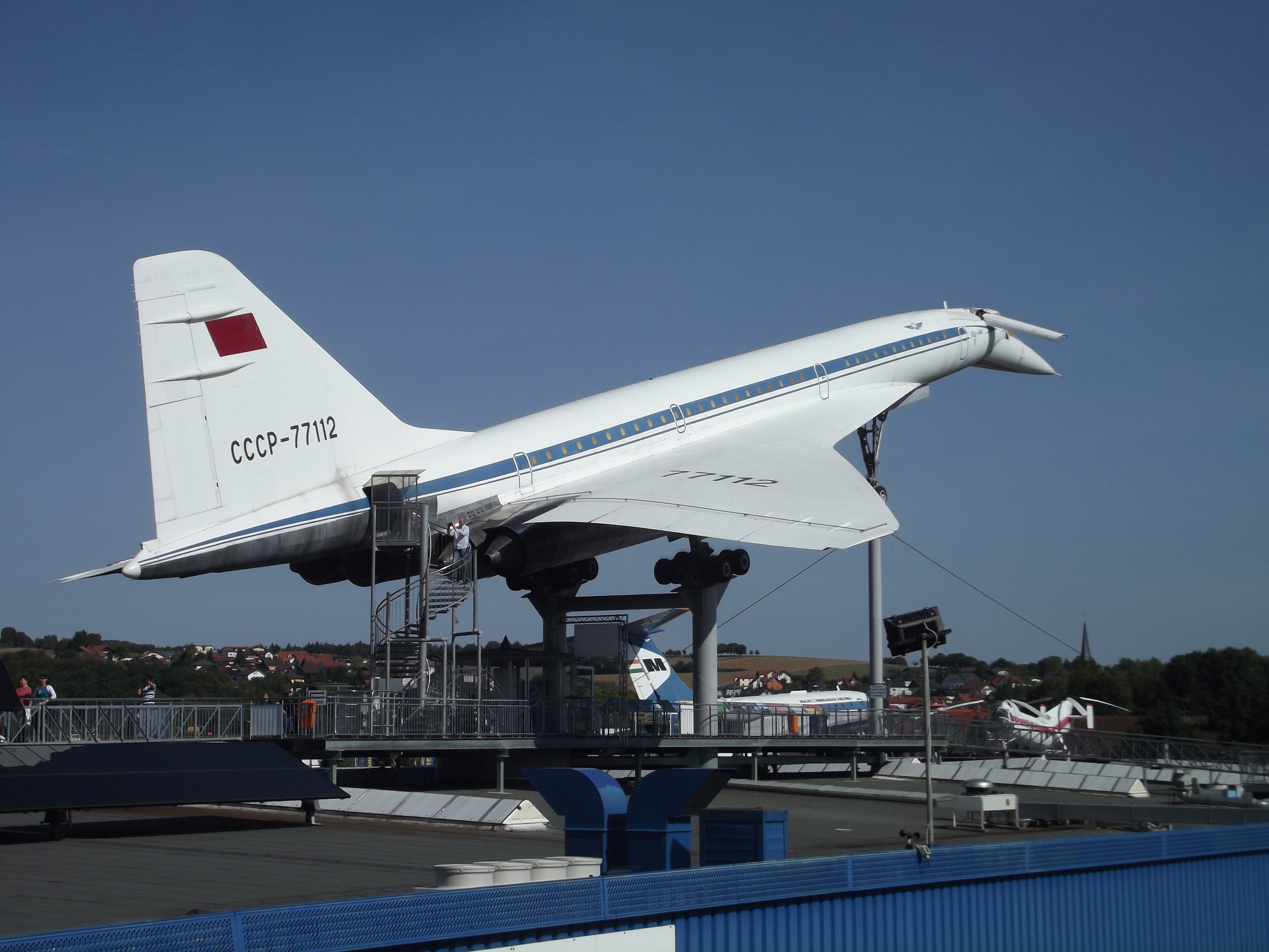 Tu-144 na střeše Technického muzea v Sinsheimu, Německo